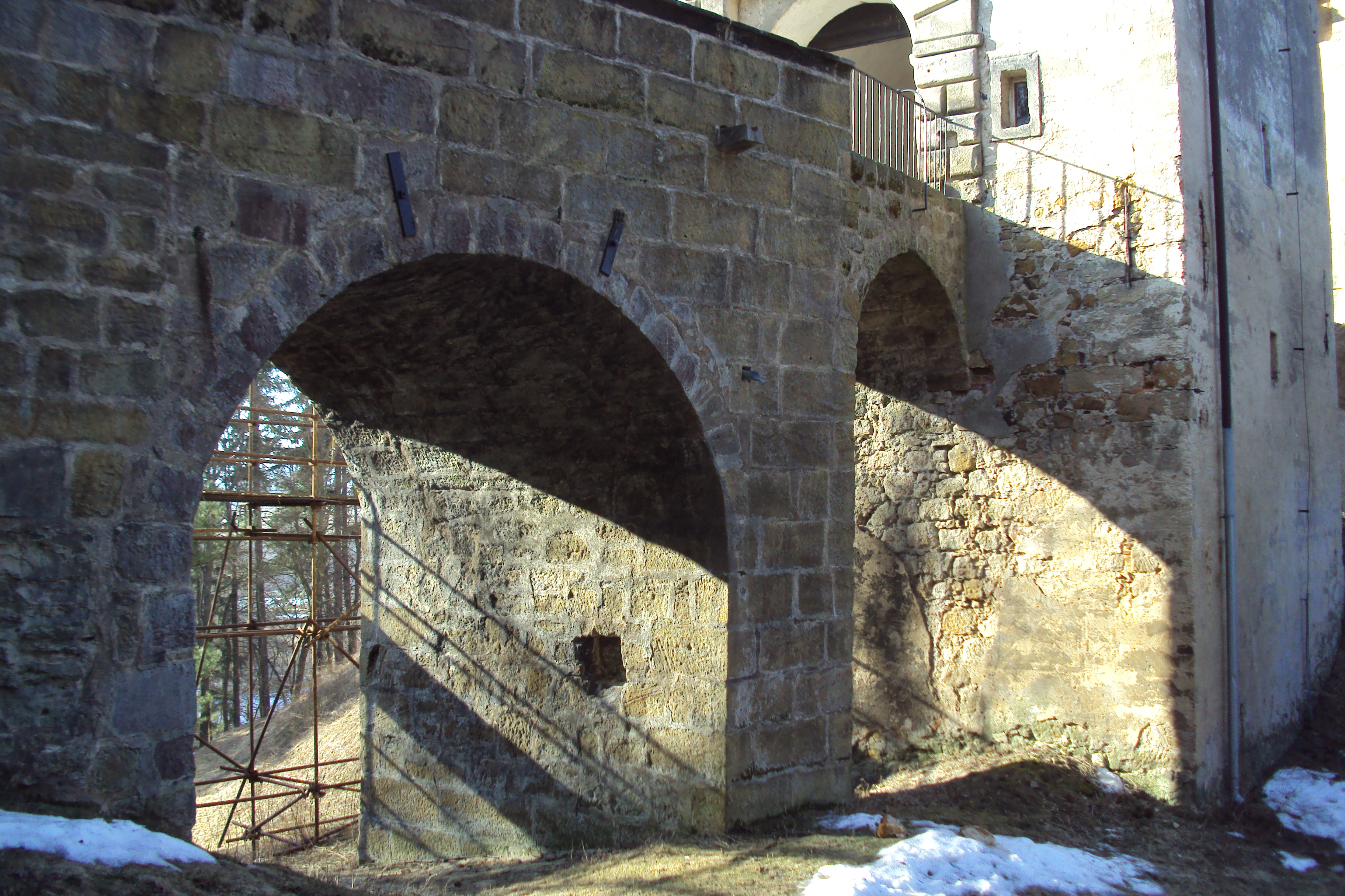 Most ke vchodu do zámku Lemberk zespodu